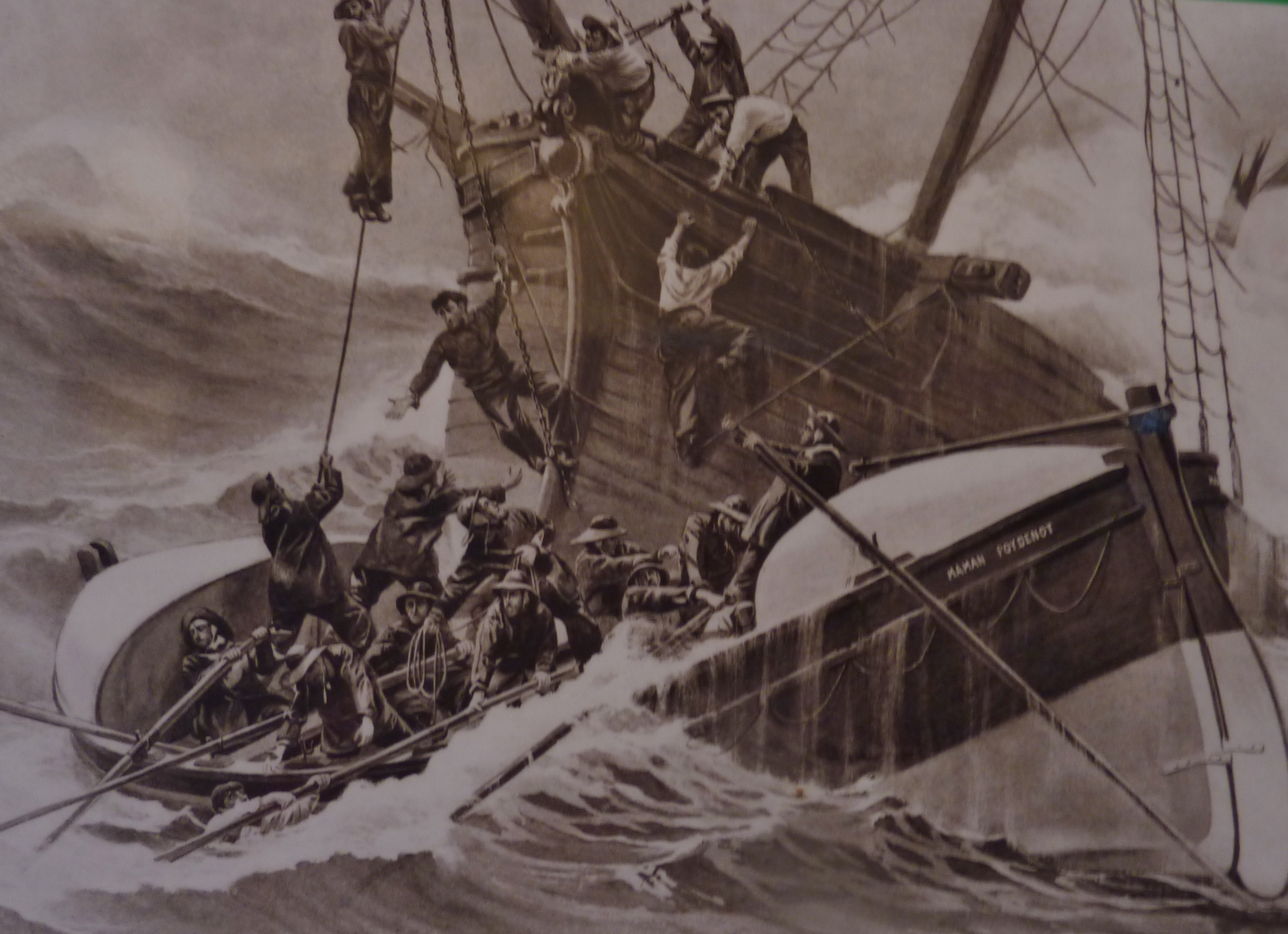 Penmarch : gravure représentant le sauvetage de l'équipage du Sancta Maria par le canot de sauvetage Maman Poydenot de Saint-Guénolé le 26 mars 1897